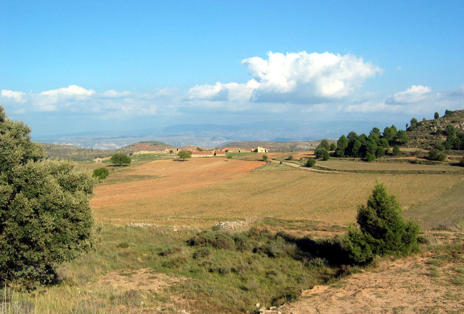 Panorama de los Corrales de la Nava desde del cerro Morrita, Castielfabib (Valencia).